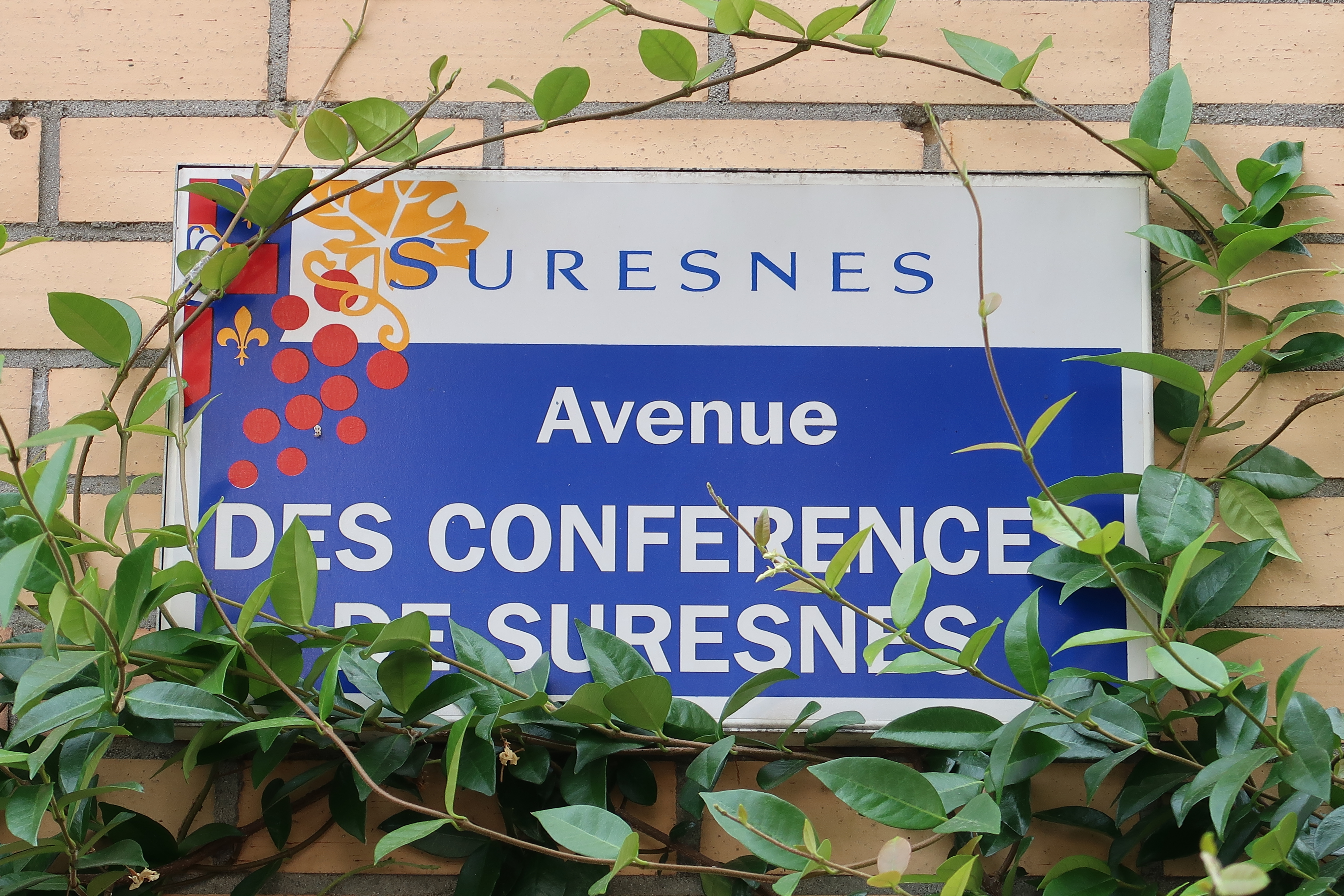 Plaque de l'avenue des Conférences de Suresnes, à Suresnes (Hauts-de-Seine).